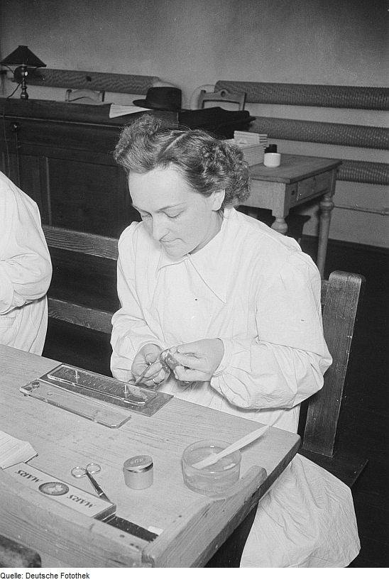 Original image description from the Deutsche Fotothek Arbeiterin bei der Trichinenuntersuchung.